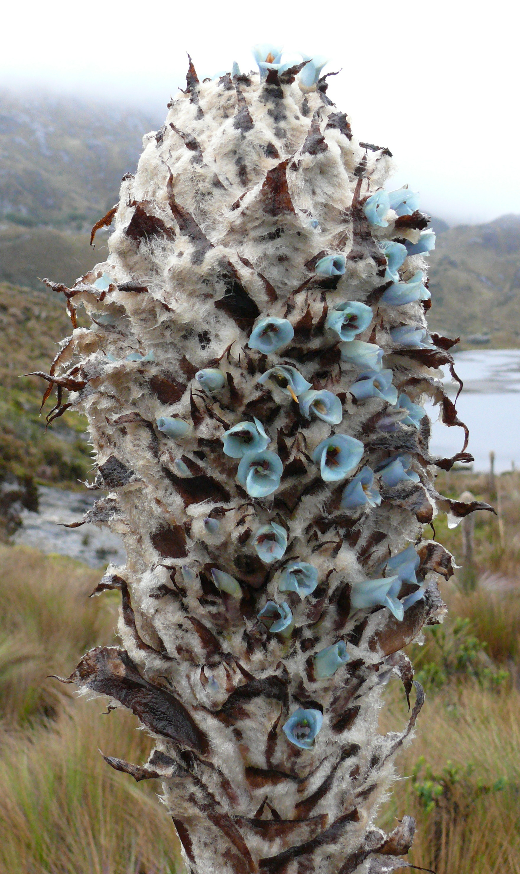 Achupilla, Aguarongo (Puya clava-herculis)